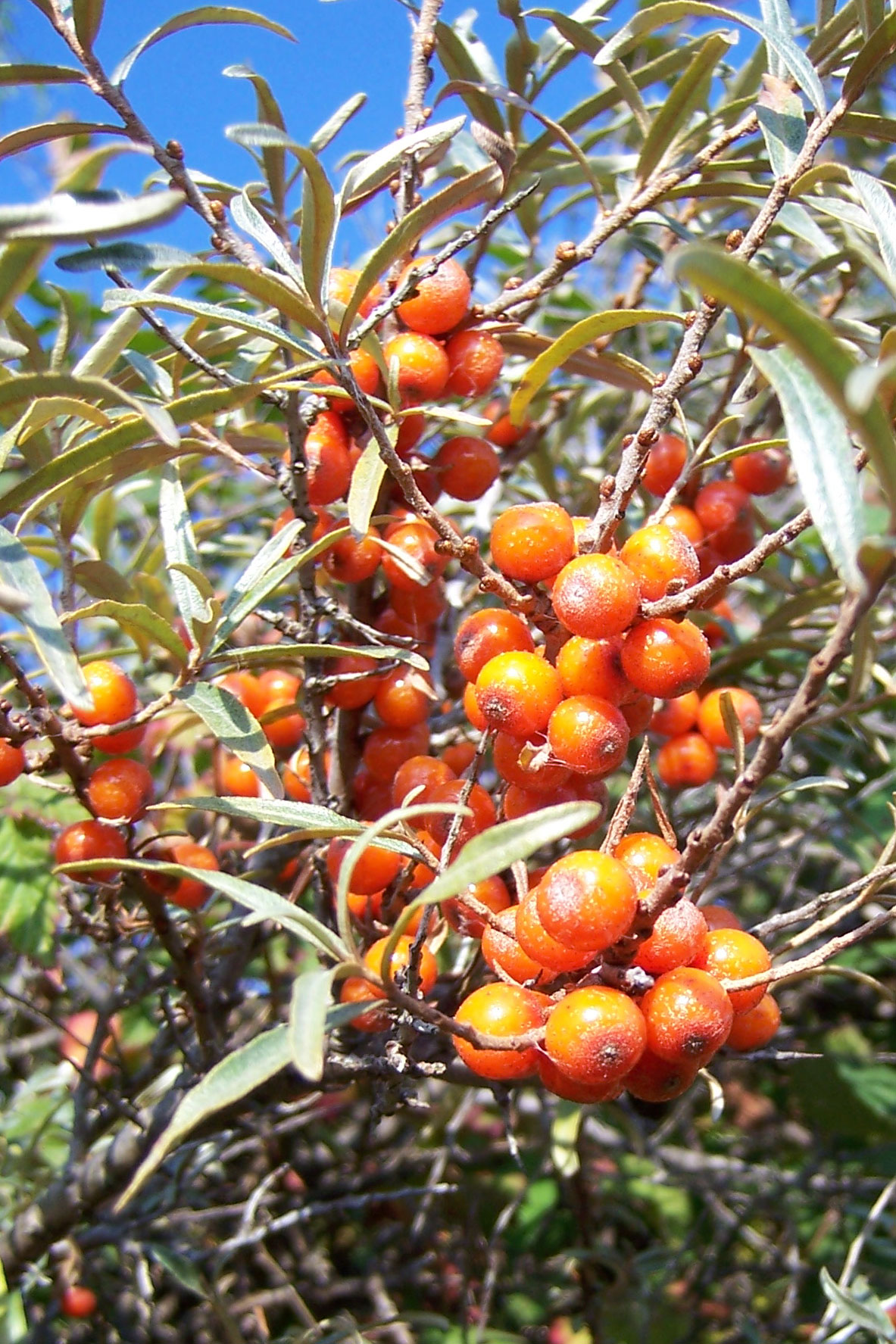 Nordseeinsel Spiekeroog: Sanddorn (Hippophae rhamnoides), auch Weidendorn genannt. An den Beeren feine Salzkristalle (Meersalz)